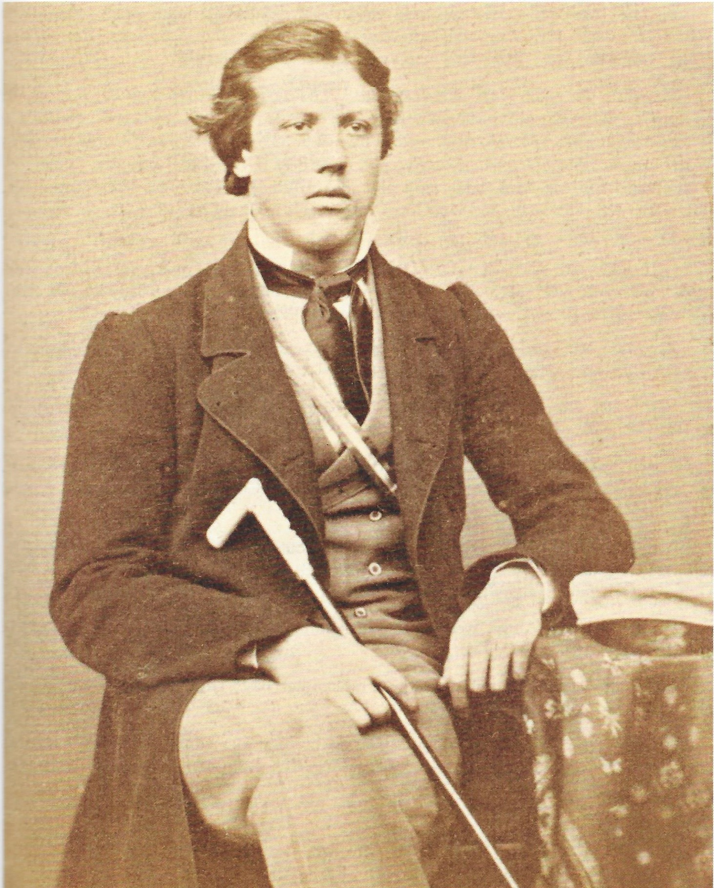 Fotografie von Theodor Brünings